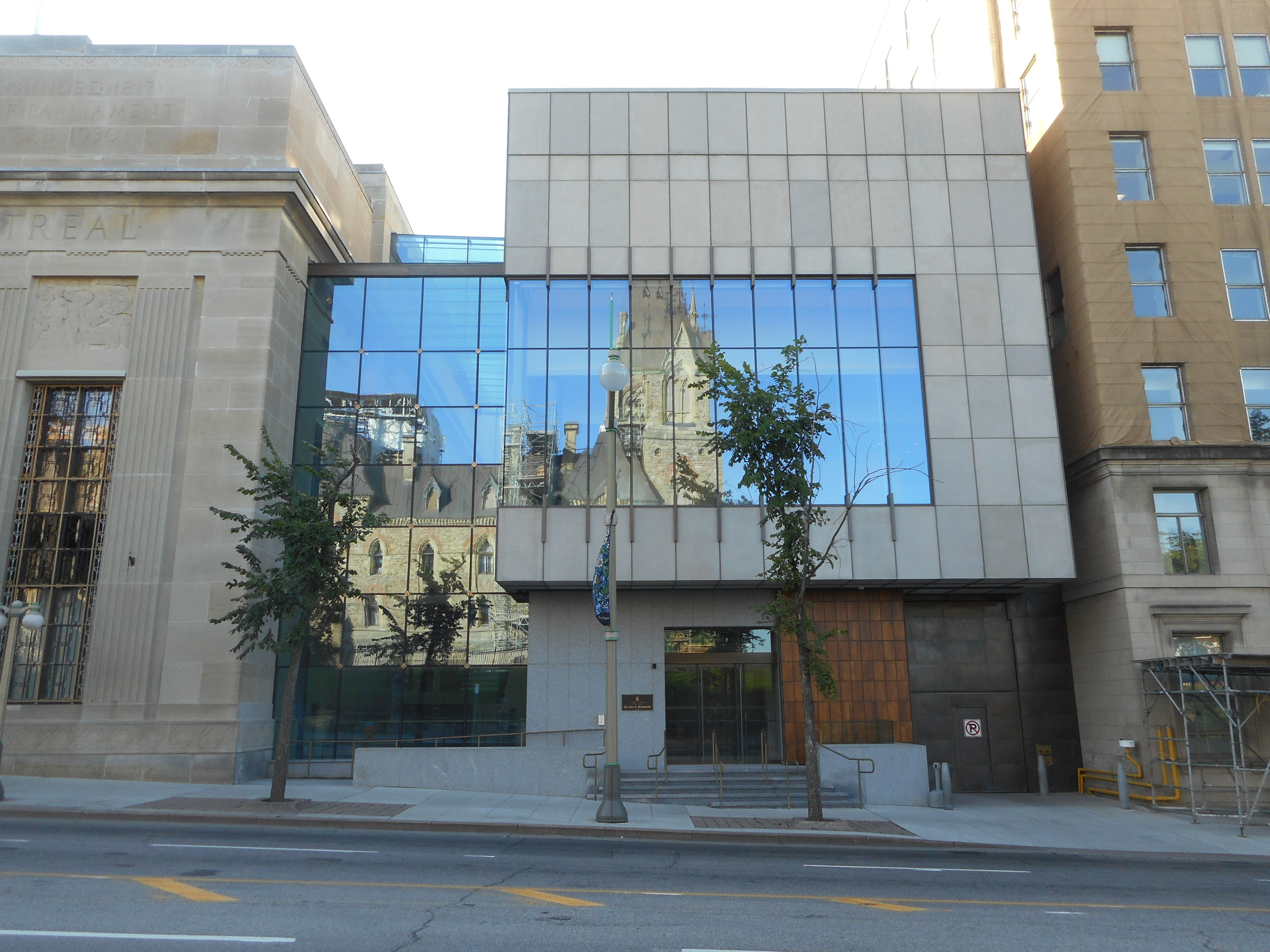 Annexe de l'édifice Sir-John-A.-Macdonald, 144, rue Wellington, Ottawa